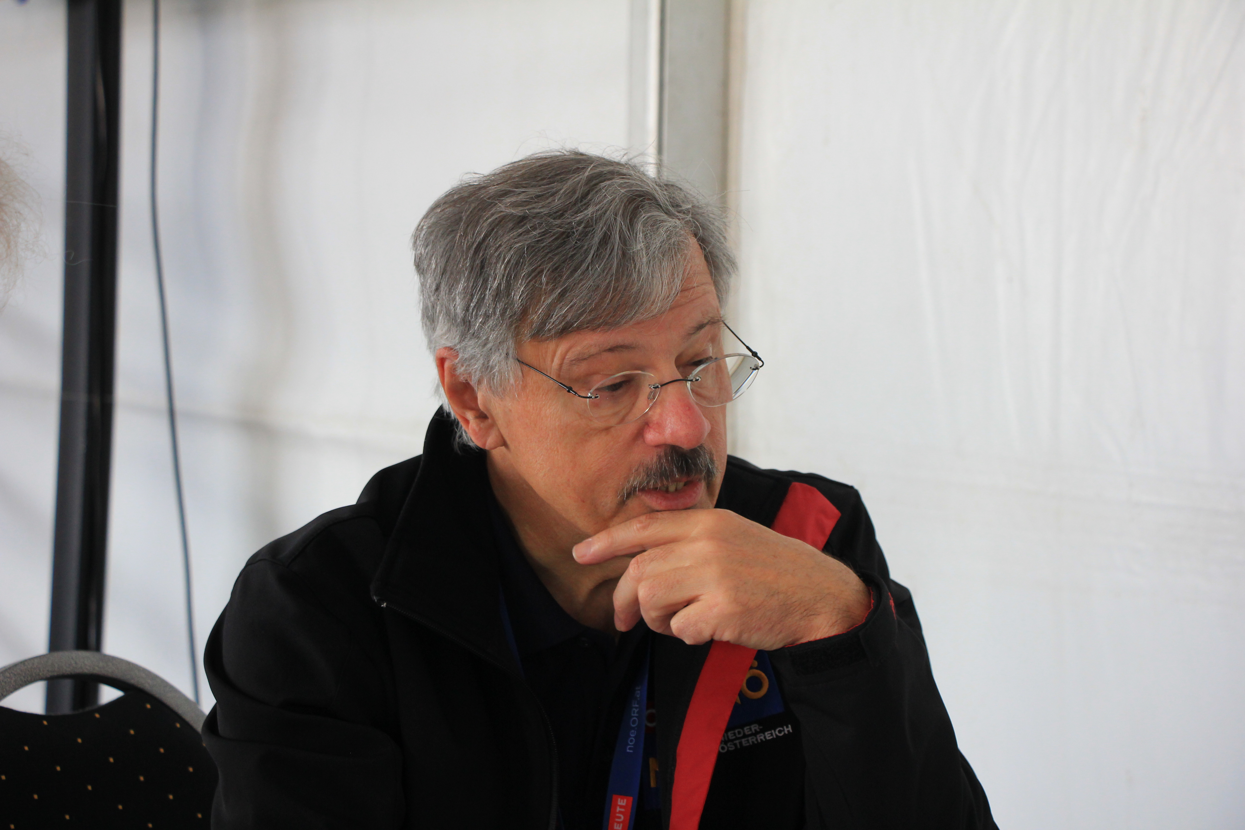 Schnappschüsse von Moderatoren am Tag der offenen Tür beim 50-Jahr-Jubiläum des ORF-Niederösterreich